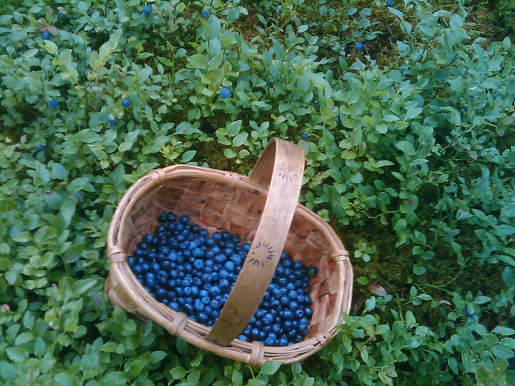 Una cesta de arándanos, en recogida.